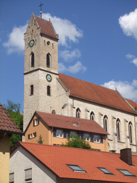 Veringenstadt, Landkreis Sigmaringen Kath. Pfarrkirche St. Nikolaus, hoch über der Altstadt